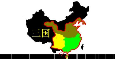 Gebiete der Drei Reiche